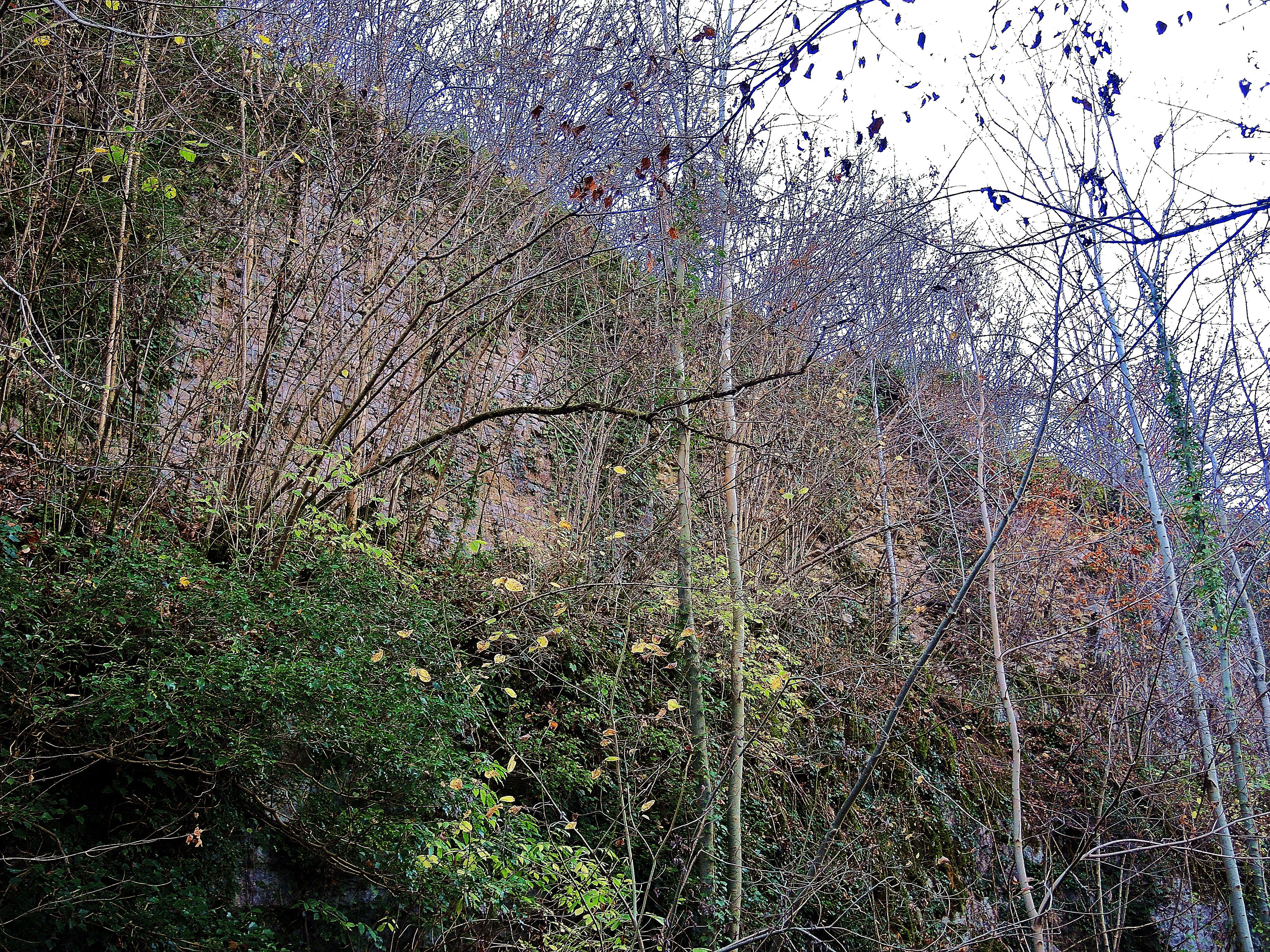 Muraille Nord-Est de l'ancien château de Neuchâtel-Urtière. Département du Doubs. France.